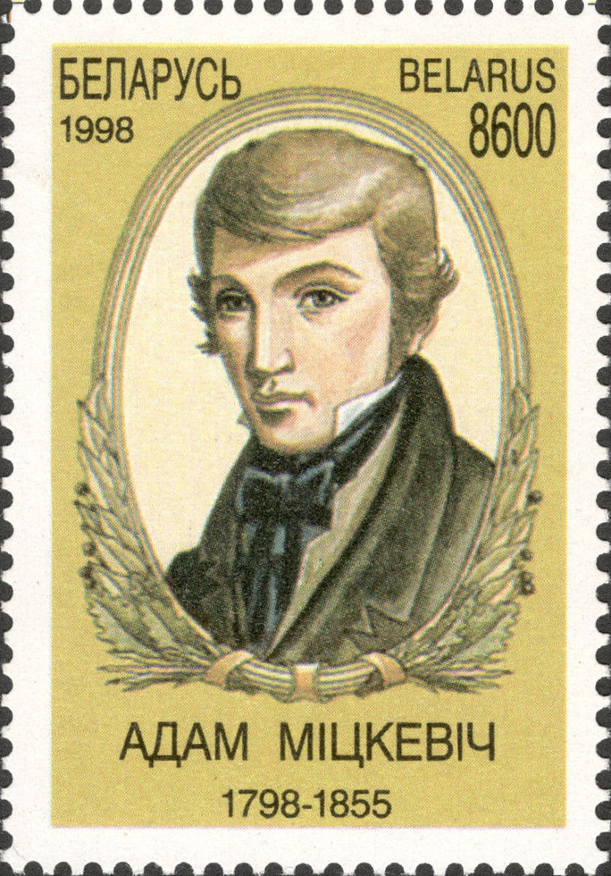 Беларуская (тарашкевіца): Адам Міцкевіч. Белпошта